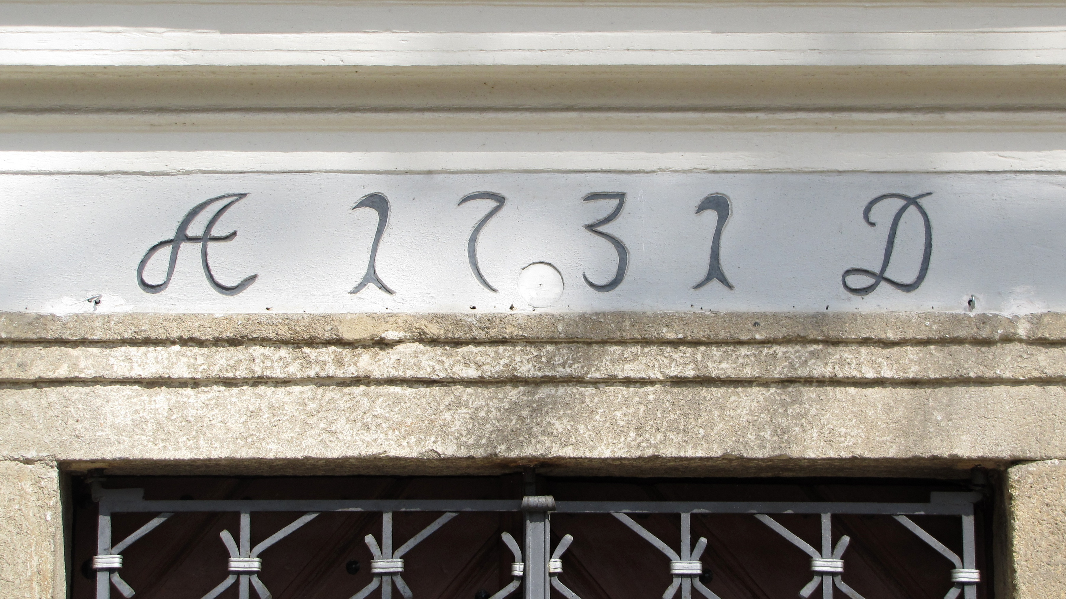 Kaple svatého Vendelína v Čejči, nápis nad vchodem: Anno Domini 1731